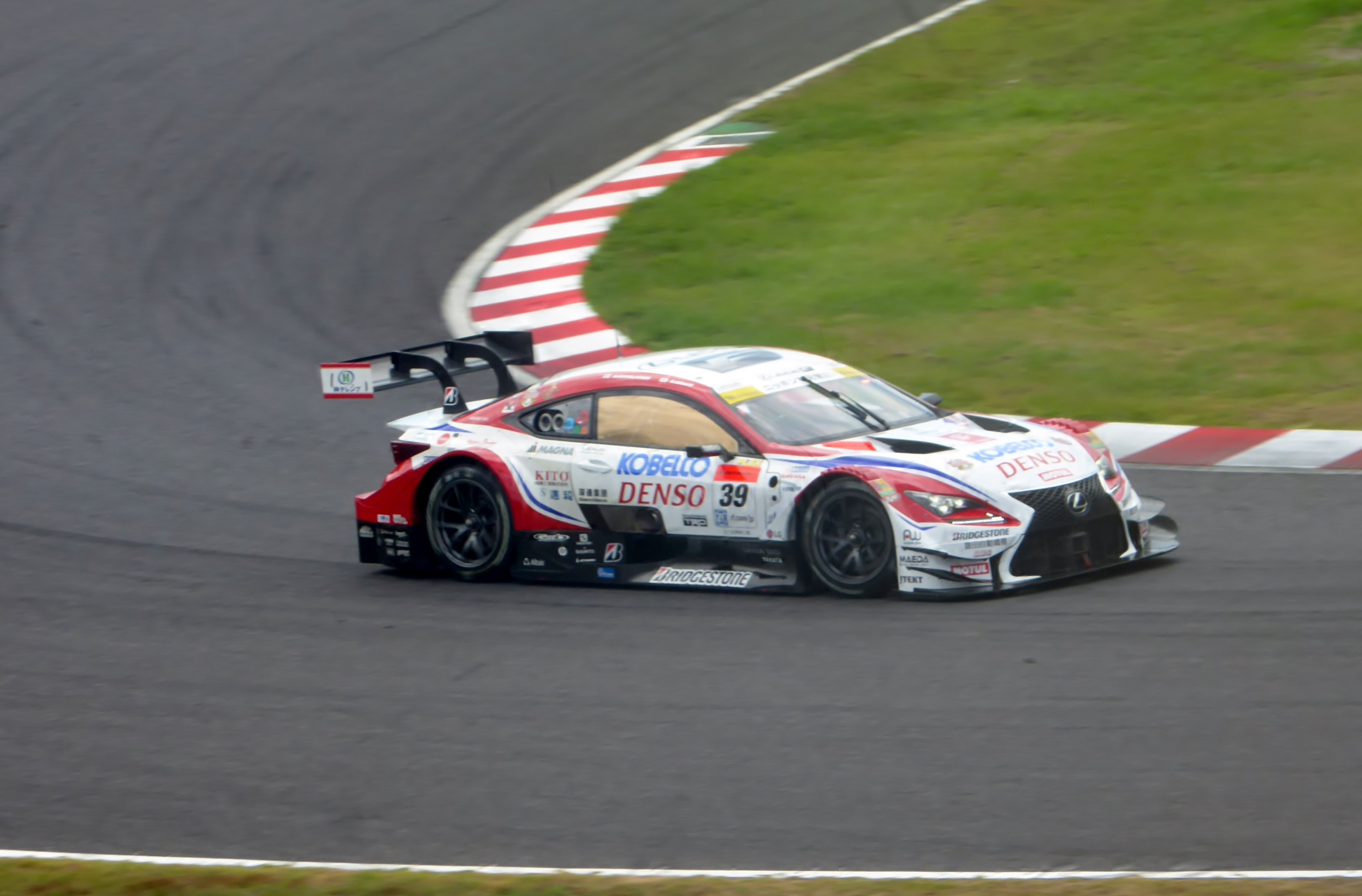 2016年鈴鹿1000㎞における39号車DENSO KOBELCO SARD RC Fを撮影。